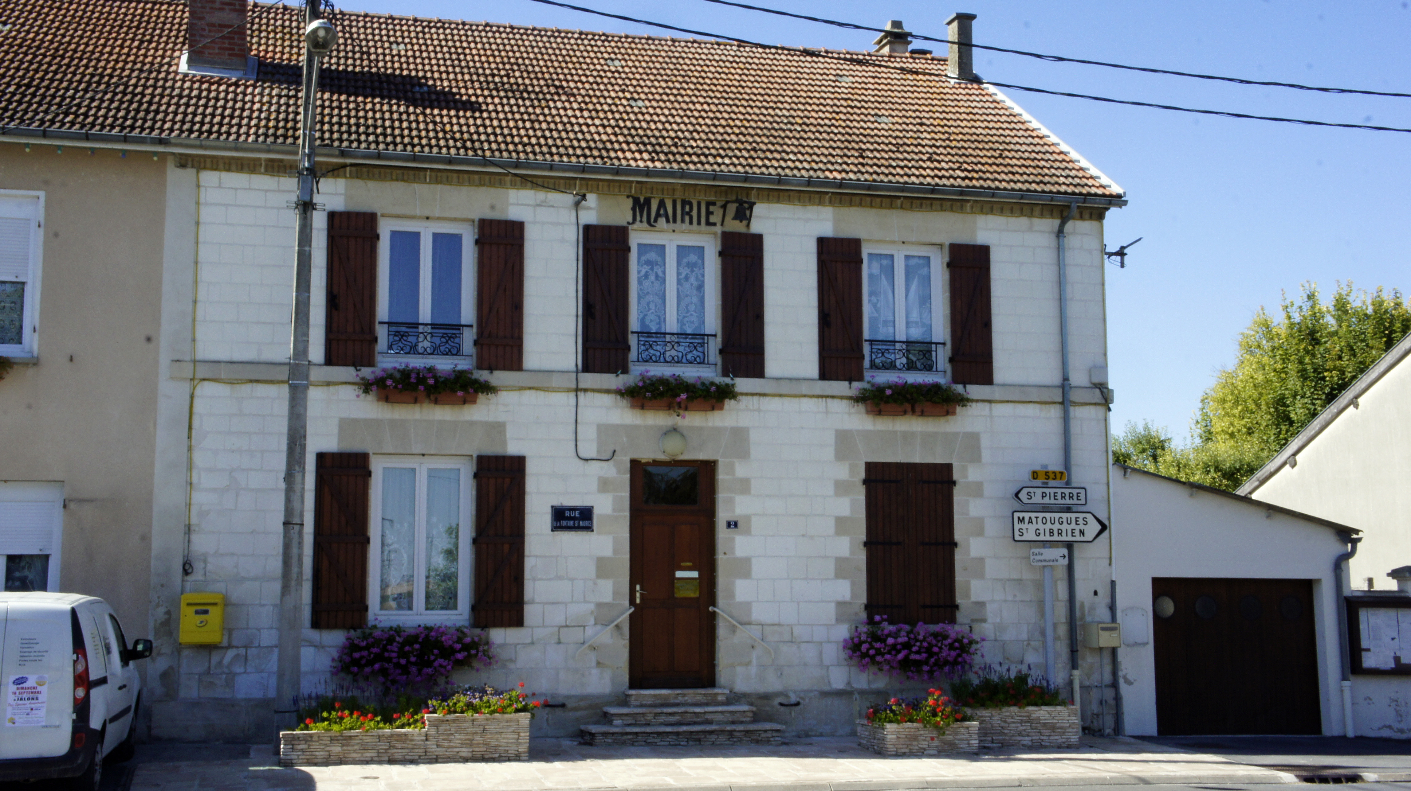 La mairie de Villers le château.